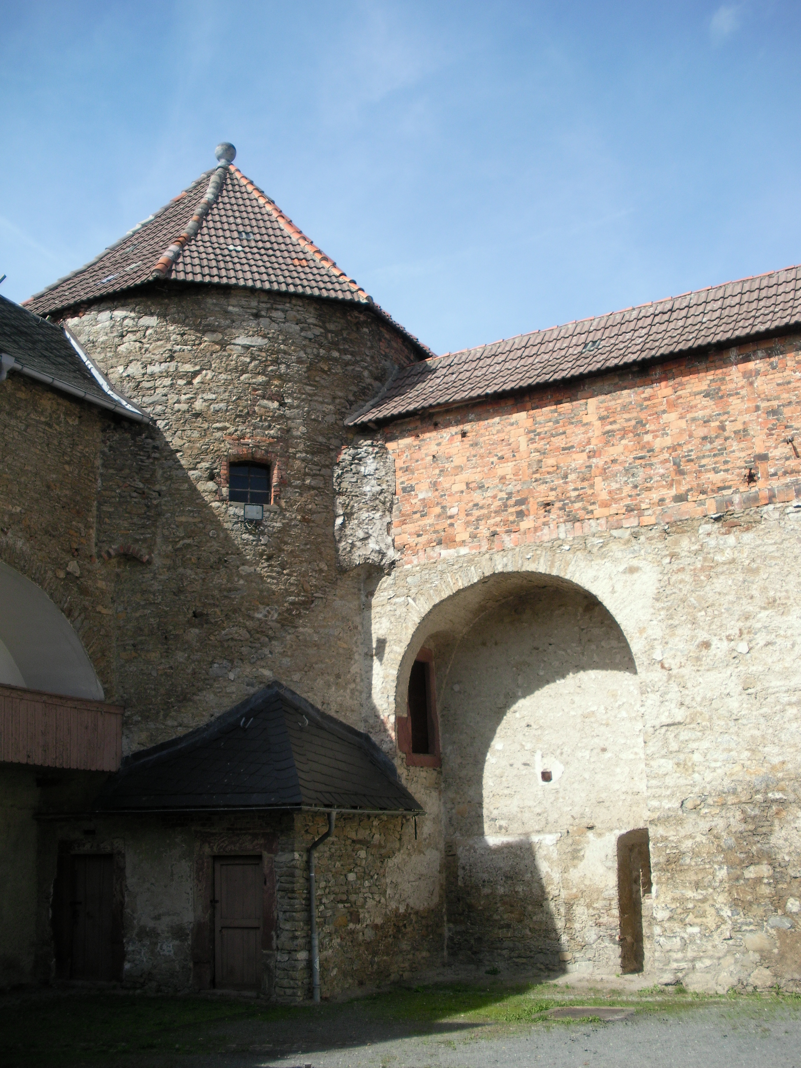 Innenhof des Schlosses in Harzgerode